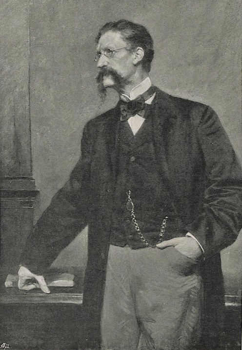 Max Koner: Bildnis des Malers Otto Brausewetter, 1894